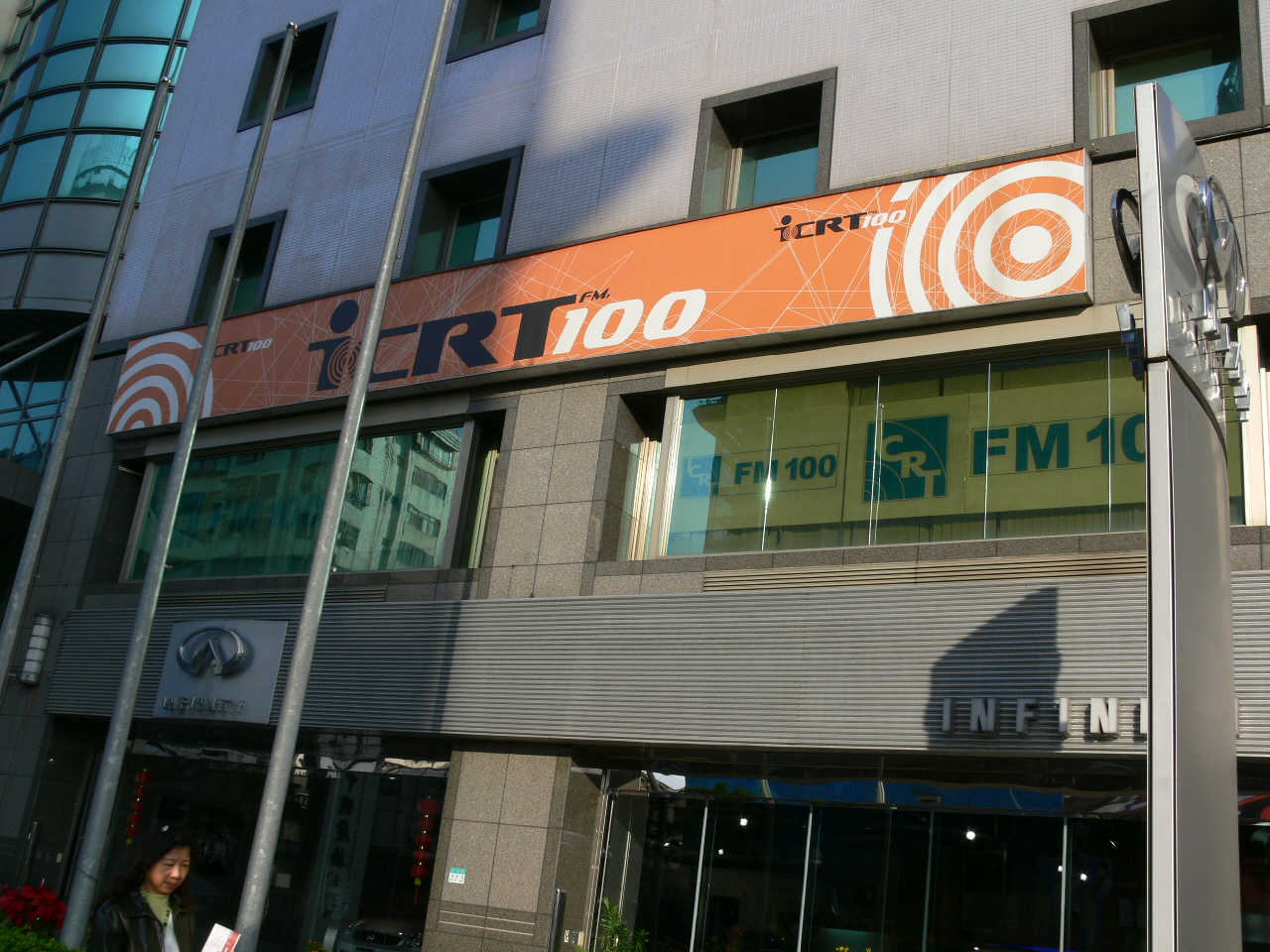 台北國際社區廣播電台總台，設於中廣松江大樓二樓。